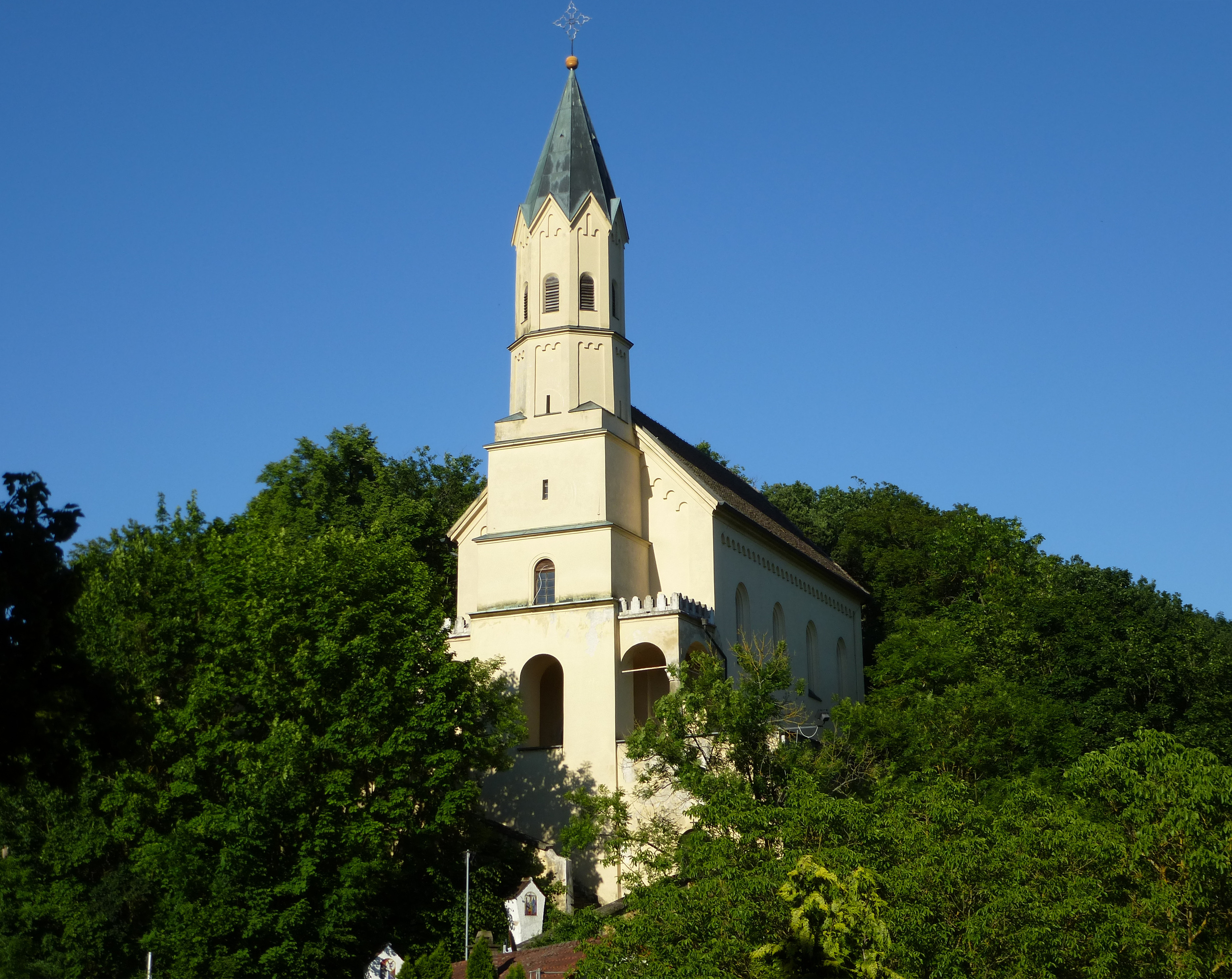 Kath. Neben- und Wallfahrtskirche St. Salvator, Donaustauf